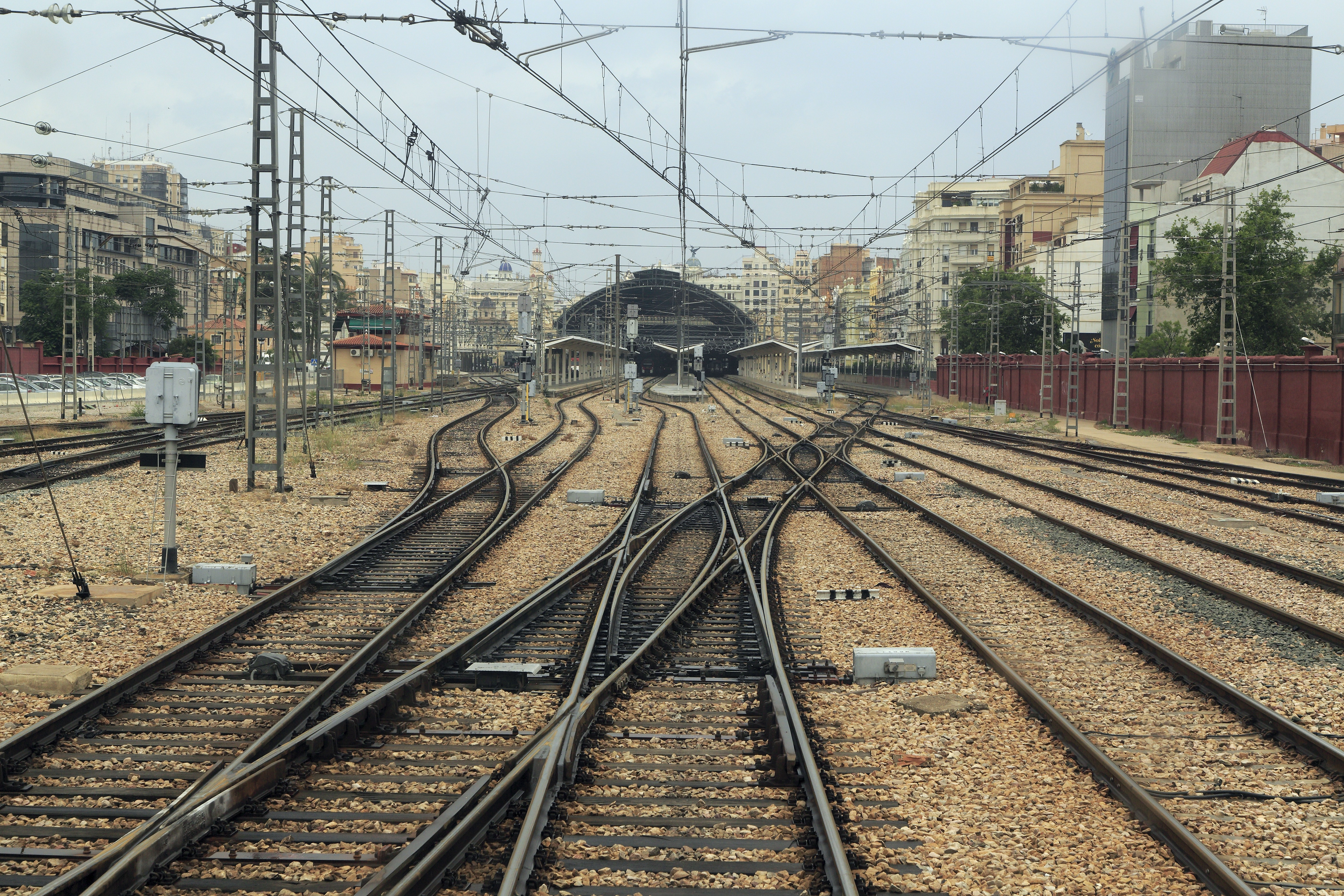 Eine der beiden Weichenstraßen, die sämtliche Bahnsteiggleise verbinden. Die S-Bahn nutzt die links außerhalb der Halle liegenden Nahverkehrsbahnsteige.